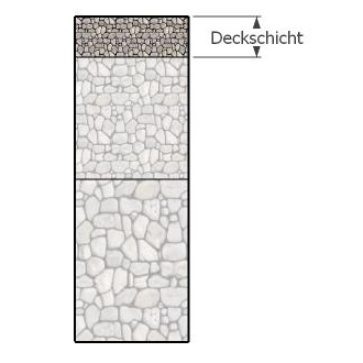 Straßenaufbau mit Darstellung der Deckschicht